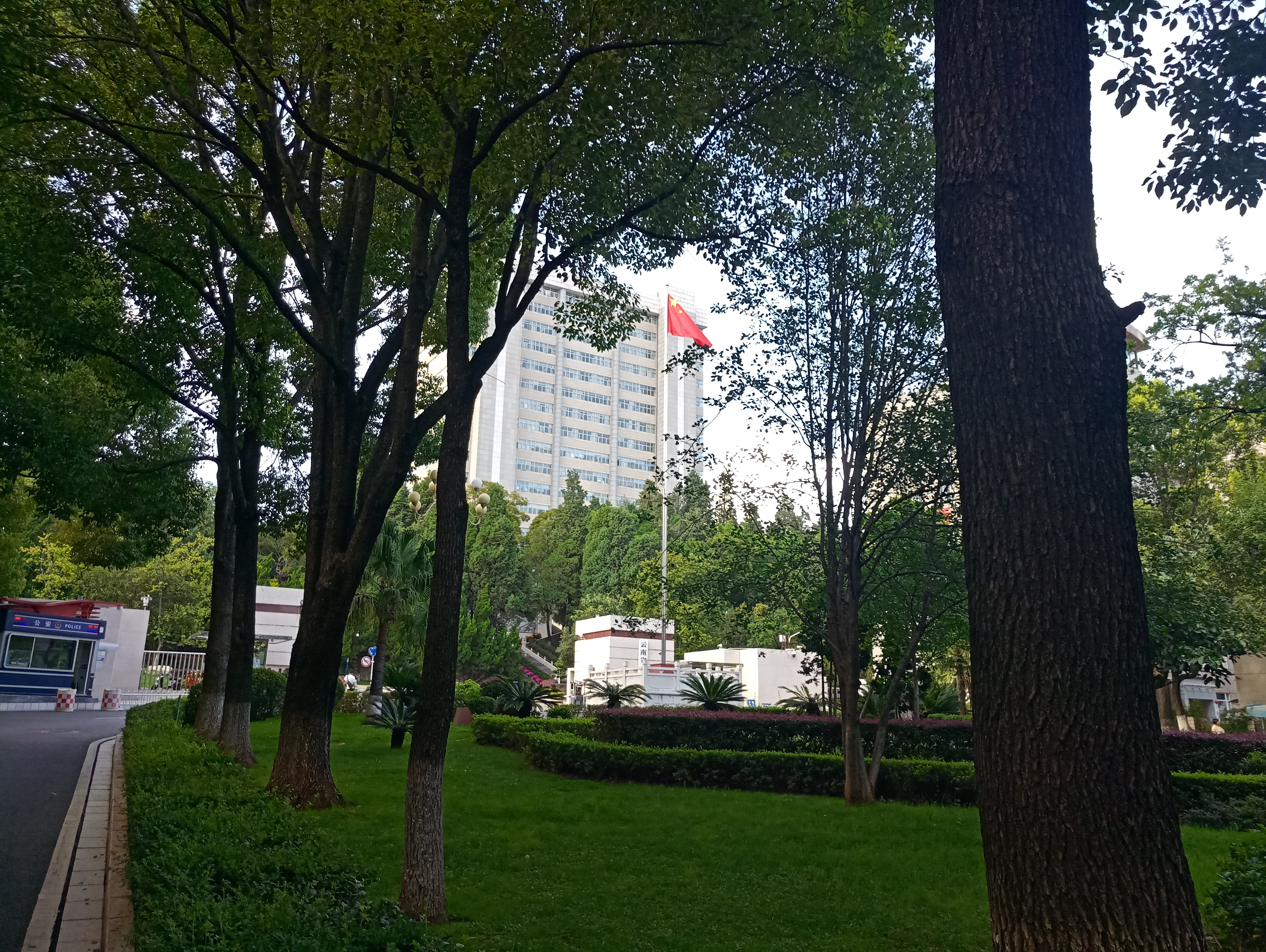 中文（中国大陆）: 云南省人民政府